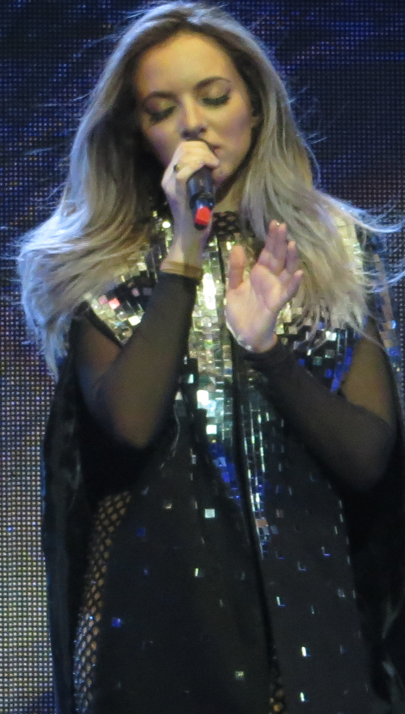 Little Mix 11